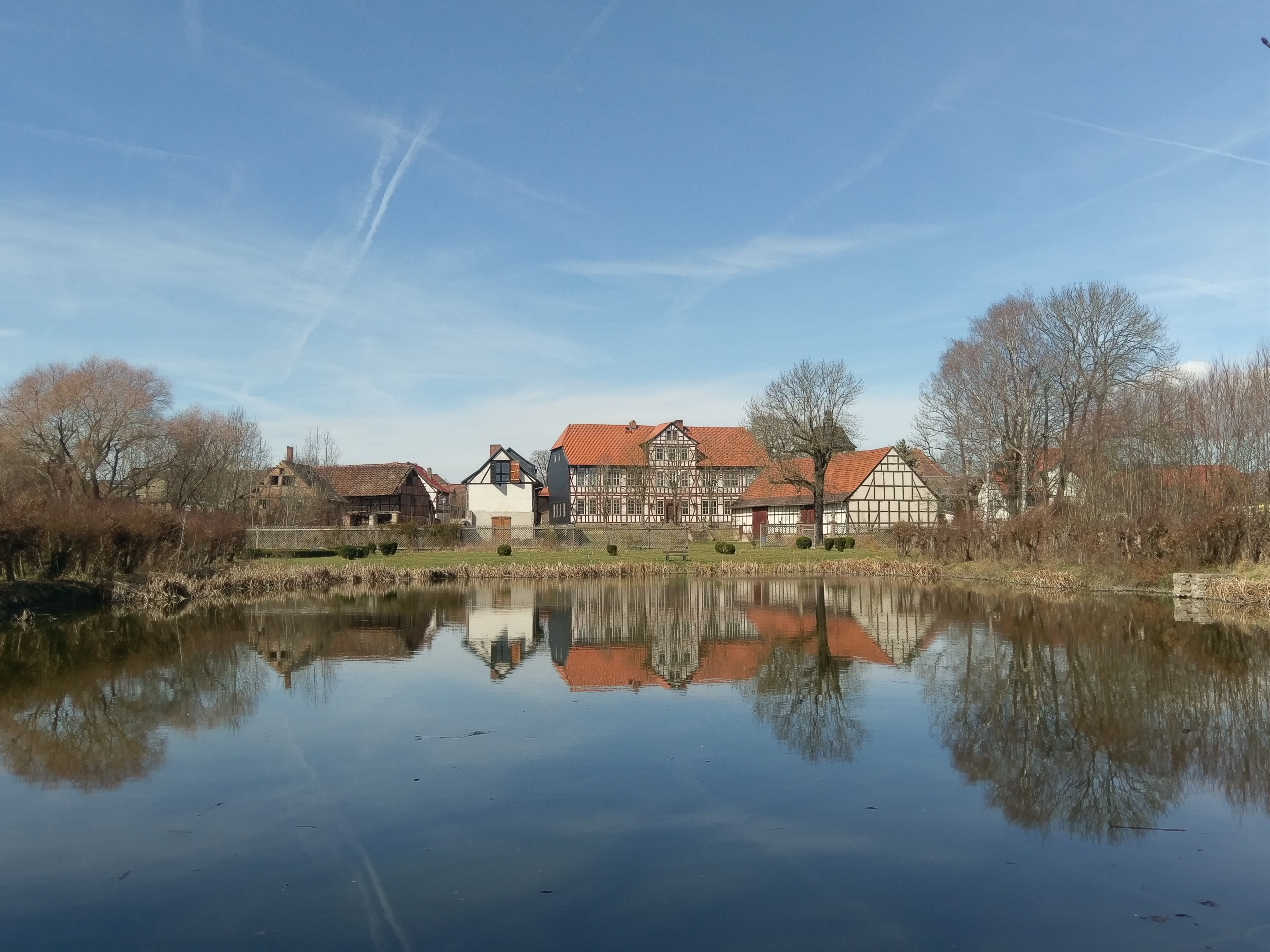 Blick aus Osten über den Parkteich auf Schloss mit flankierenden Wirtschaftsgebäuden.